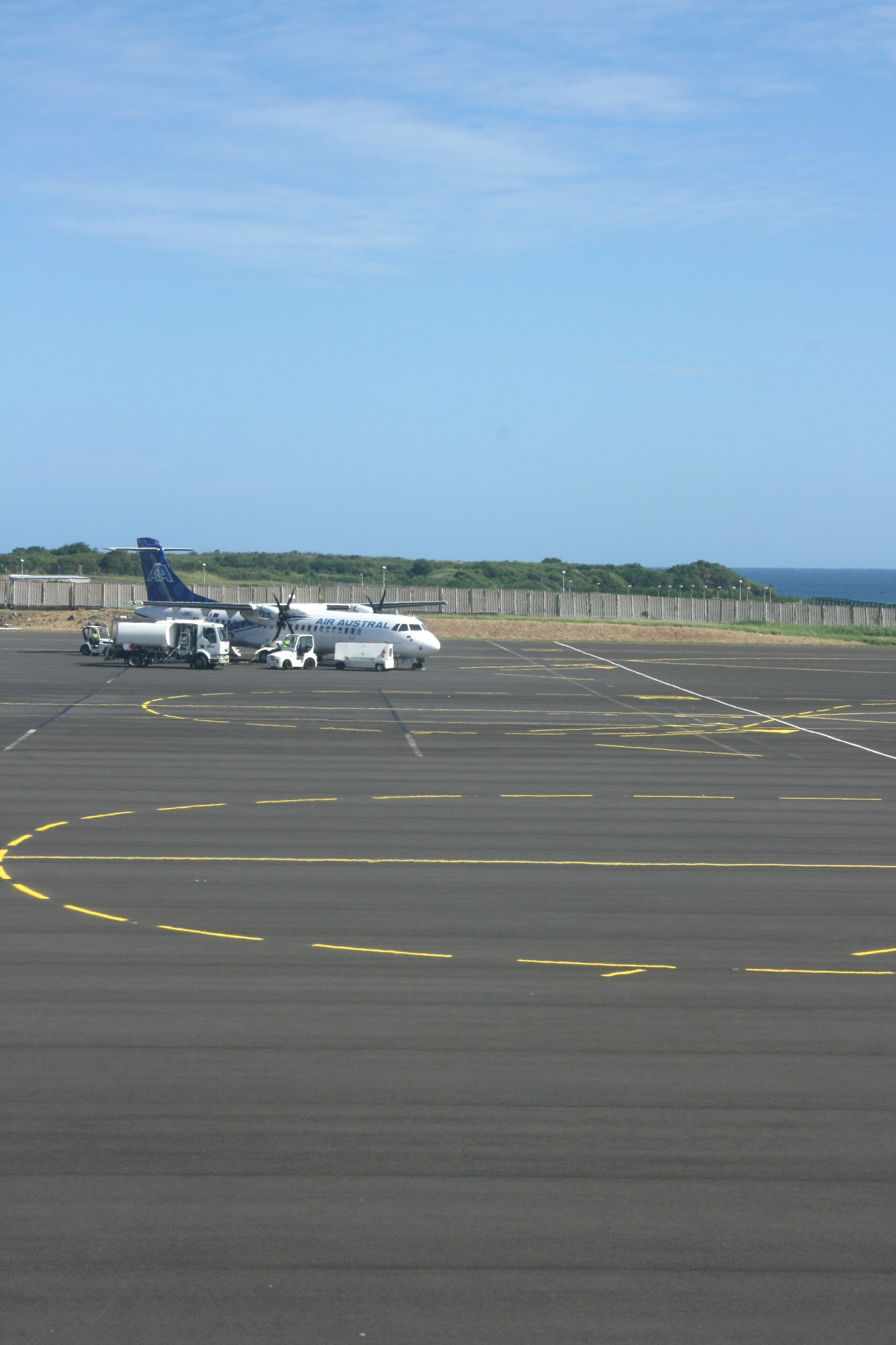 Avion d'Air Austral à l'aéroport de La Réunion Roland-Garros.